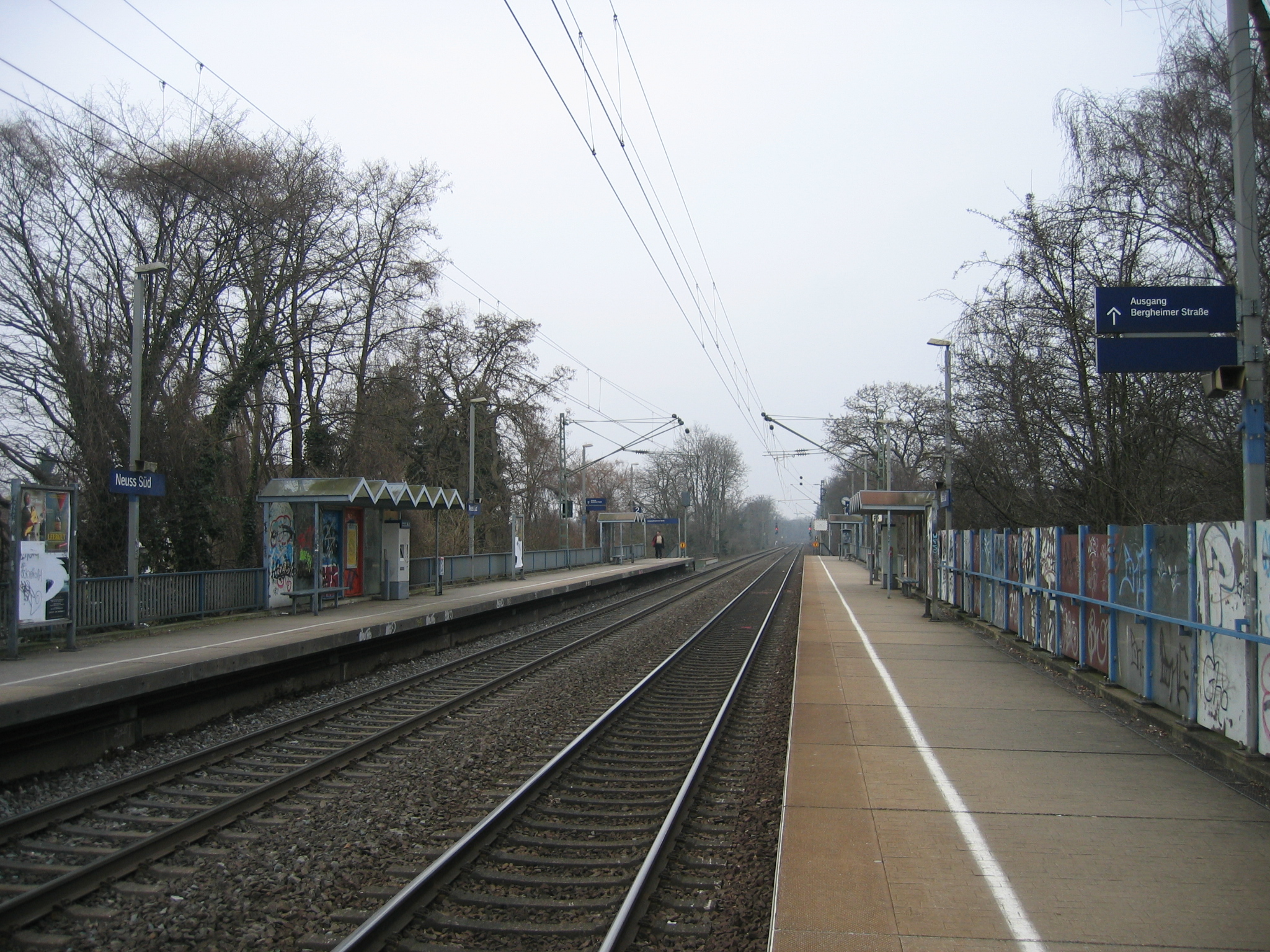 S-Bahnhof Neuss Süd